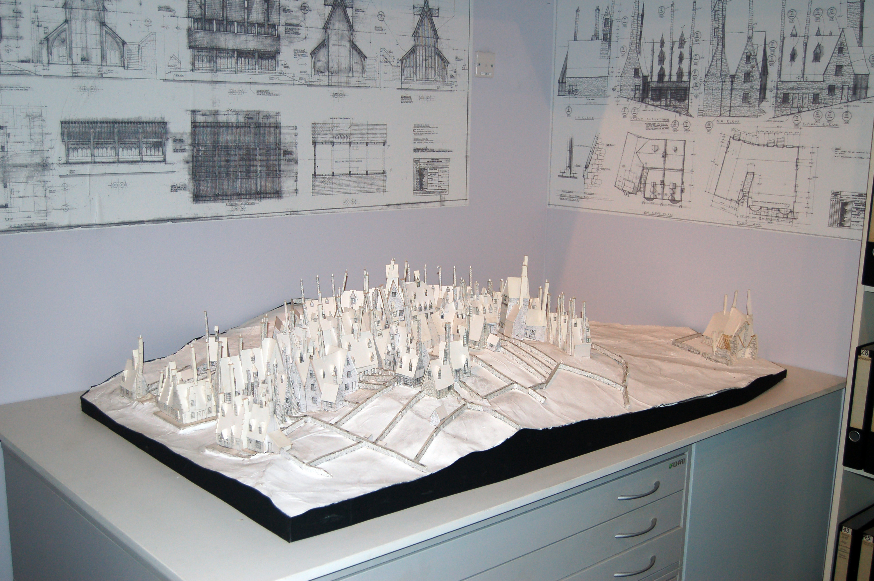 Hogsmeade (Scale Model)